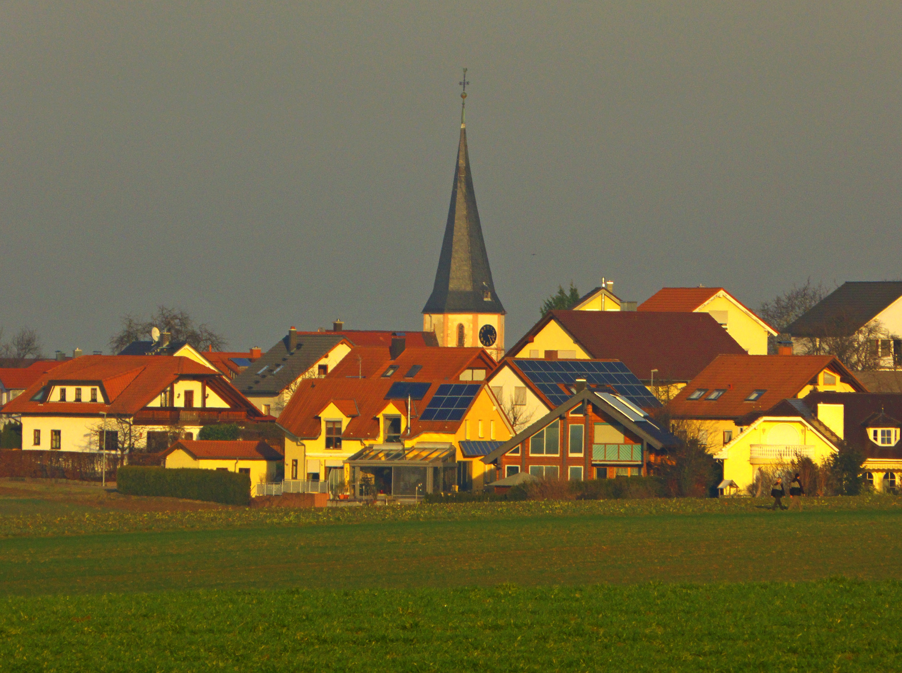 Church Of Göbrichen